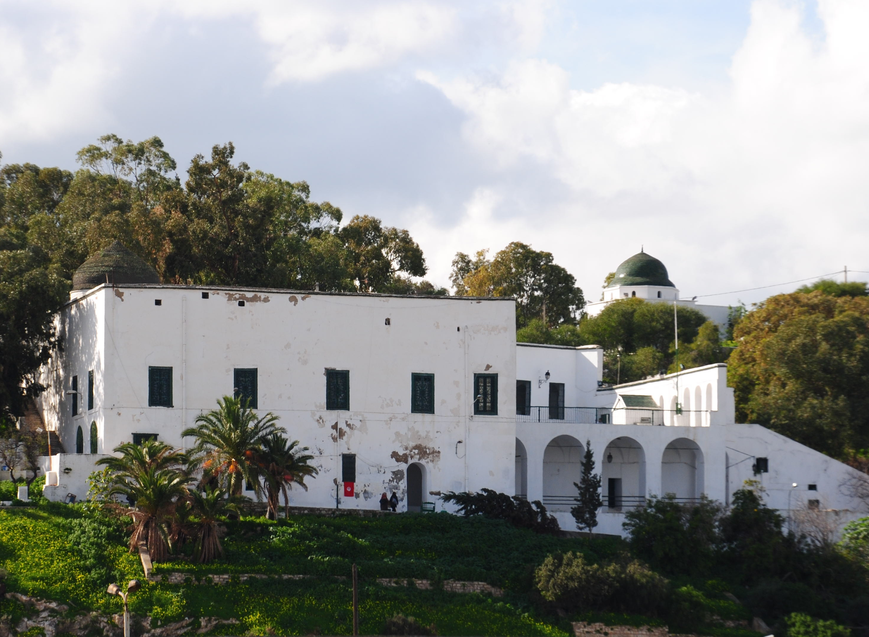 Grotte de Sidi Belhassen